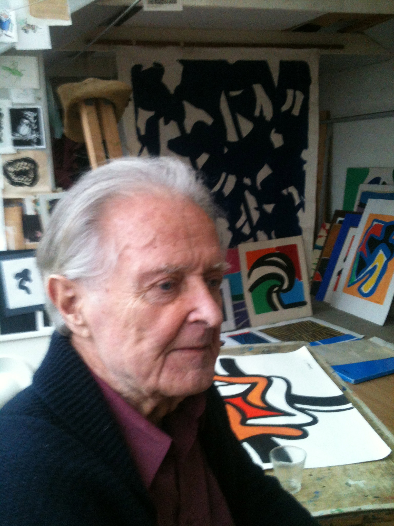 Olle Langert dans son atelier en 2014